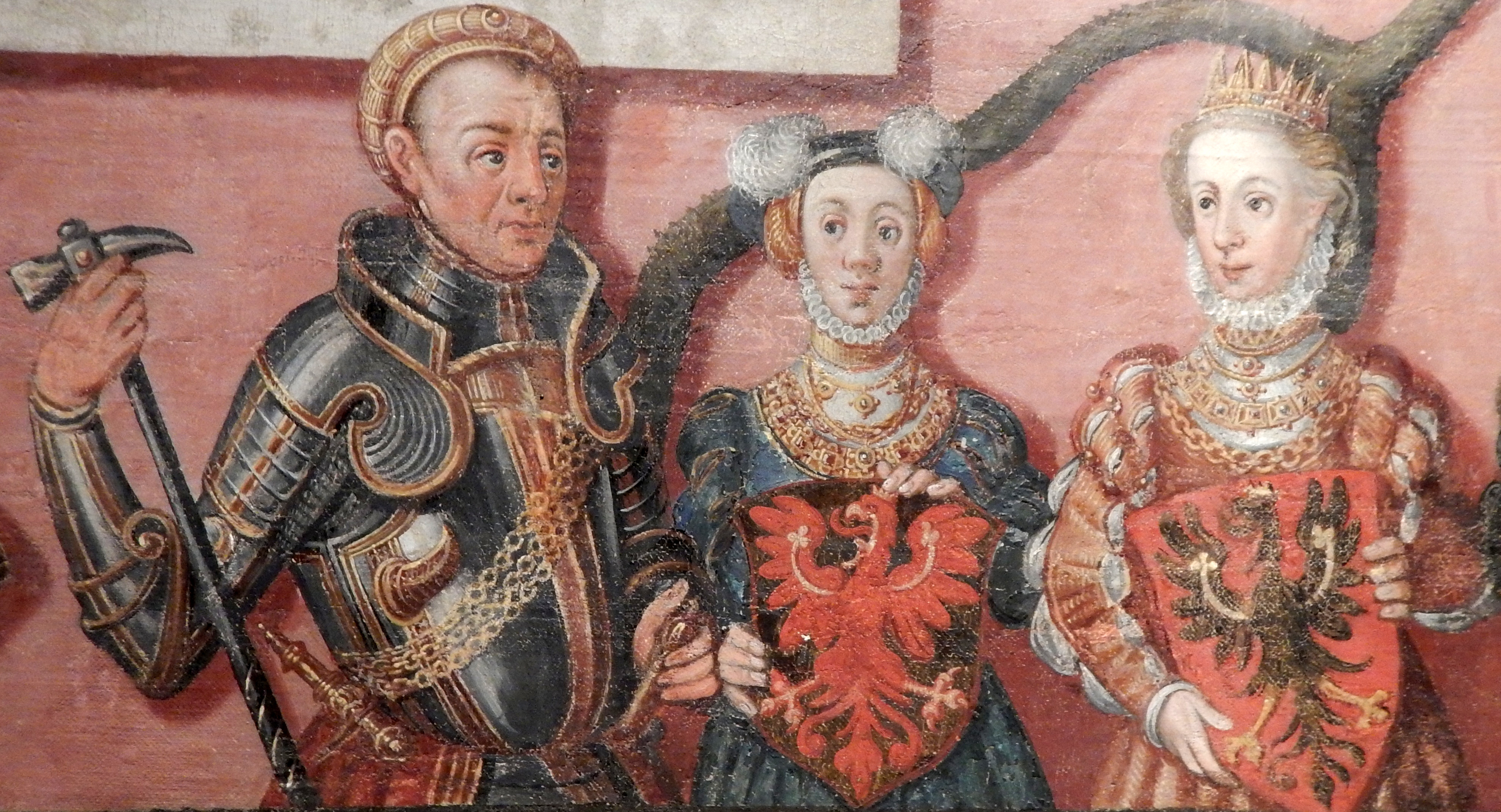 Bogislaw X. mit seinen Gemahlinnen Margareta von Brandenburg und Anna von Polen.